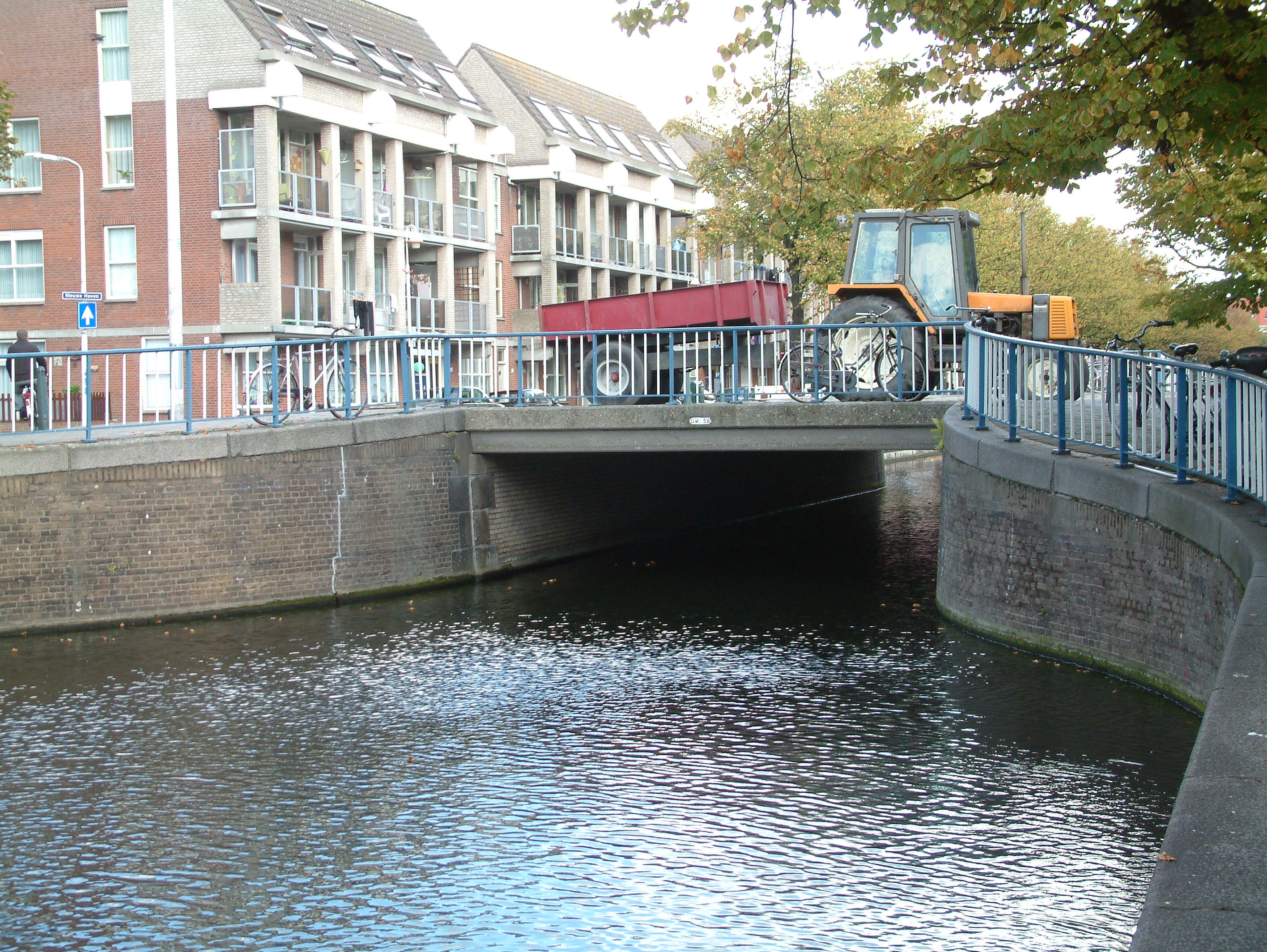 Brug in Den Haag